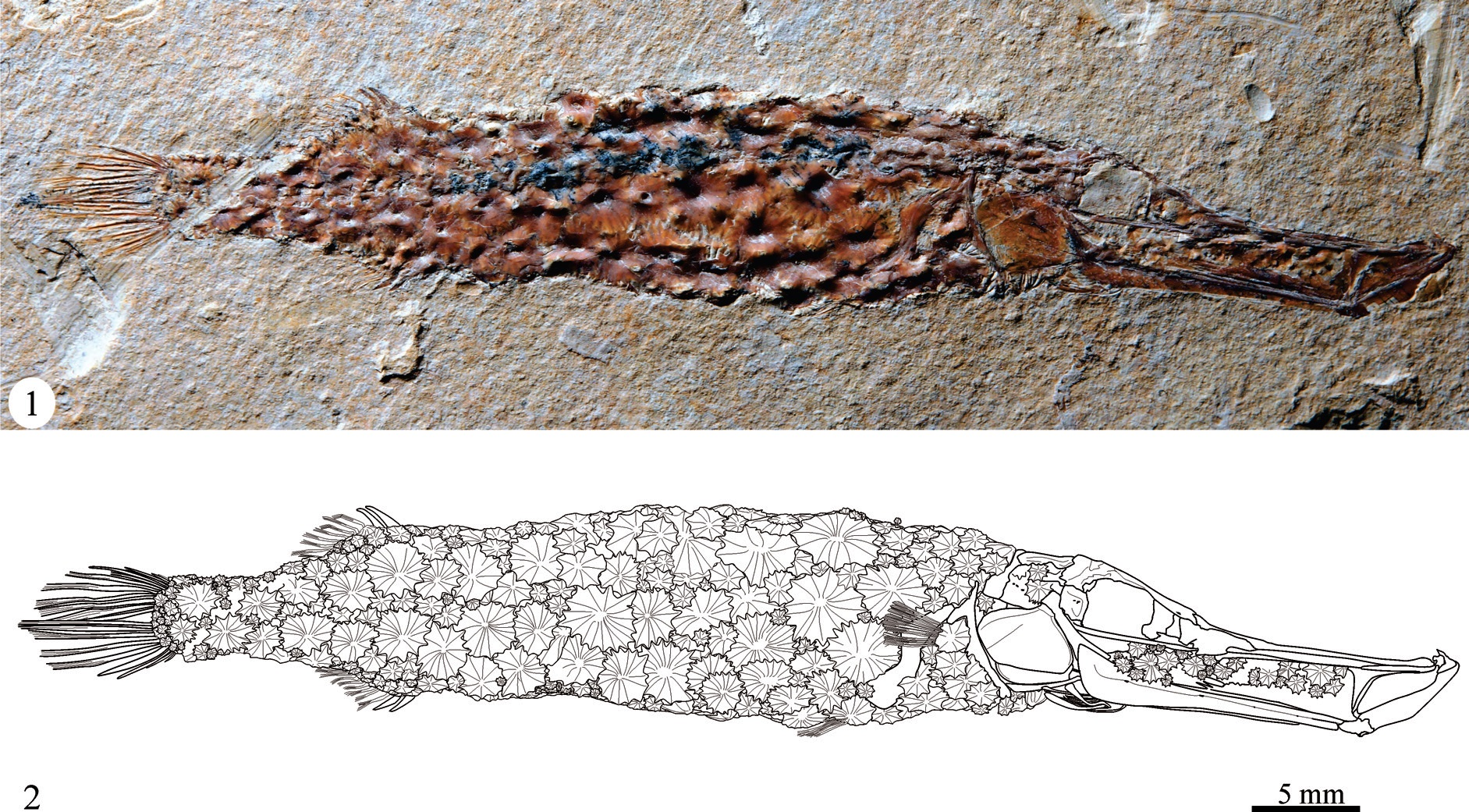 Eekaulostomus cuevasae gen. and sp. nov. from the Danian marine deposits of the Belisario Domínguez quarry, near Palenque, Chiapas, southeastern Mexico. 1, General view of IGM 4716, holotype and single specimen known. 2, Idealized line drawing of the same specimen.